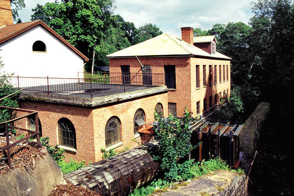 Ryfors Ironworks, Mullsjö, Västergötland